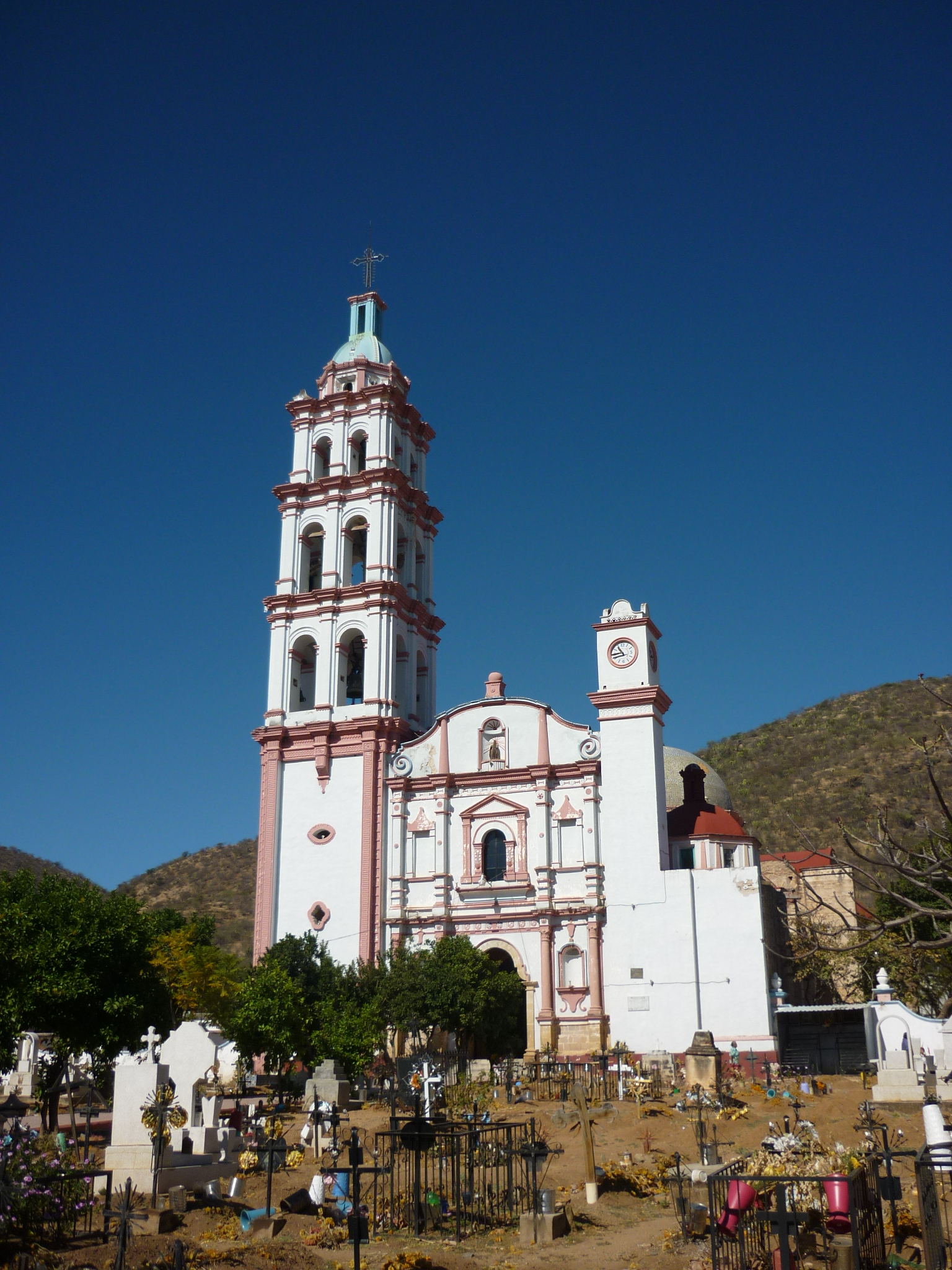 iglesia de dia San Jerónimo Xayacatlán